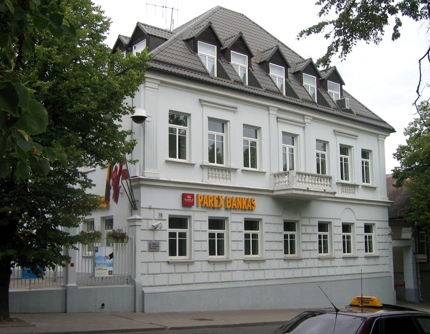 Autoriaus nuotrauka. 2006.07.29. Parex bankas. Pagrindinis ofisas, K. Kalinausko g. 12